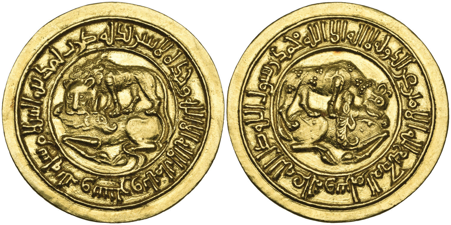 مدال پنج دیناری عزالدوله رو: لا اله الا الله وحده لا شریک له ضرب بمدینة السلام سنة ثلاث و ستین و ثلاث مائة پشت: لا اله الا الله محمد رسول الله صل الله علیه و سلم المطیع لله الامیر عزالدوله